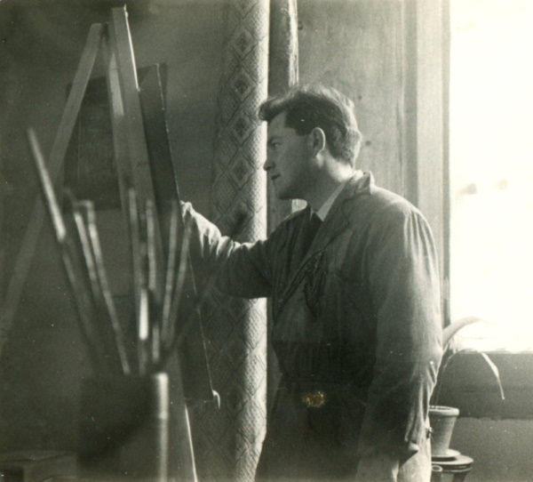 Umberto Buscioni nel suo studio, primi anni Sessanta